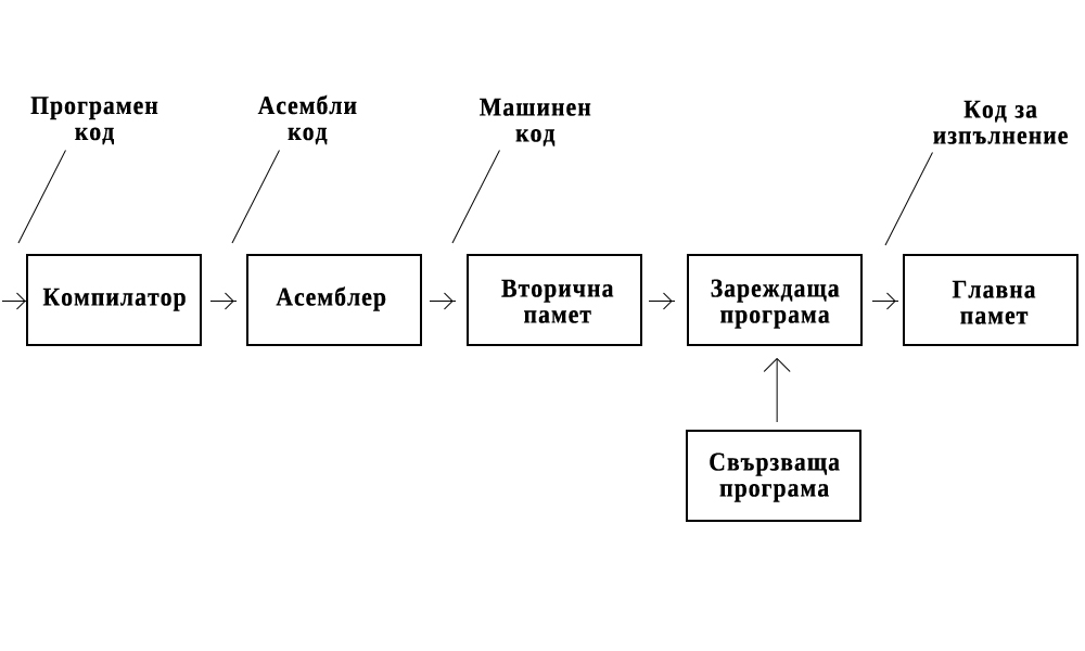 Преглед на системния софтуер на компютъра